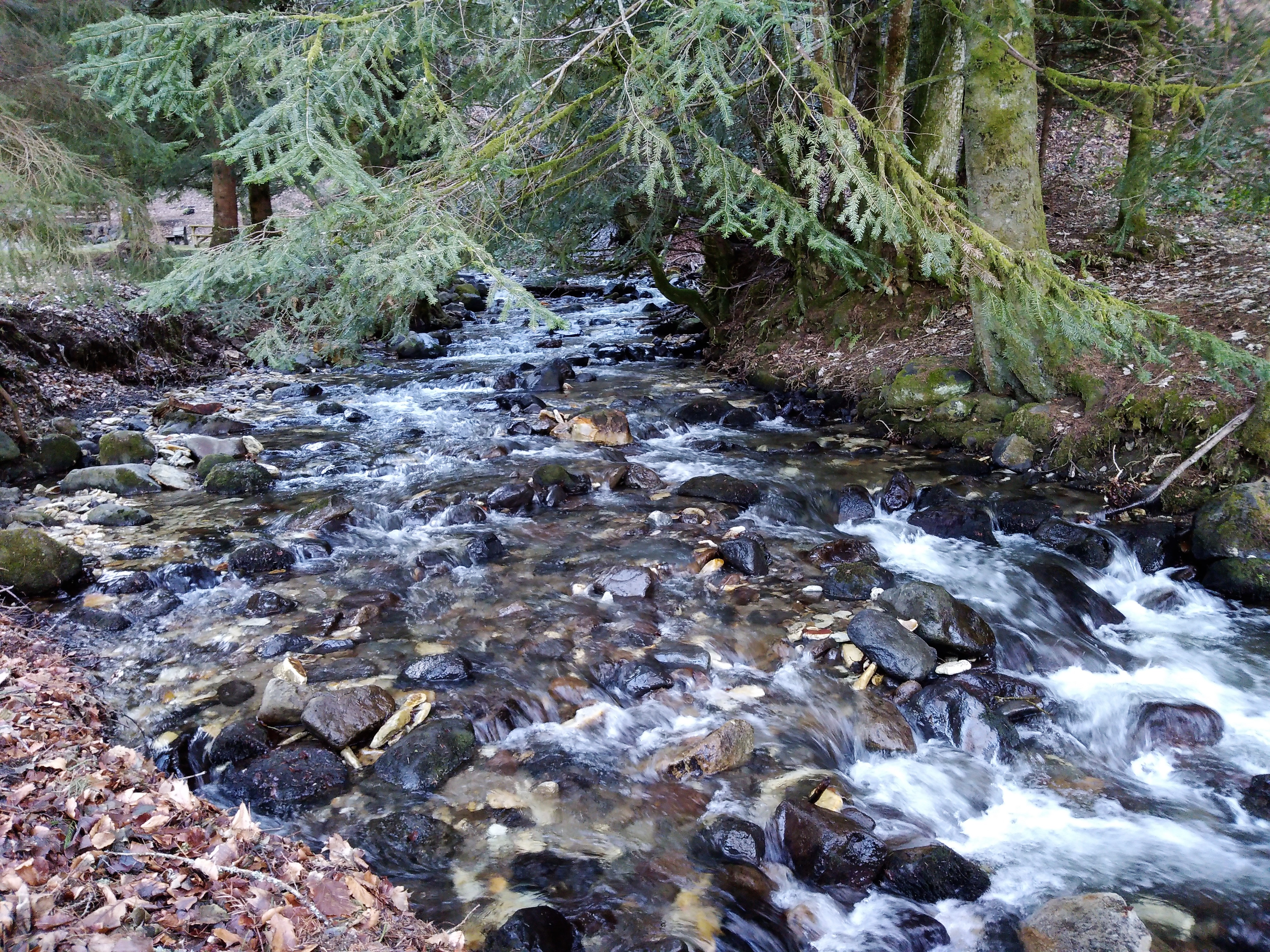 Le Vendeix à La Bourboule, Puy de Dôme, France.